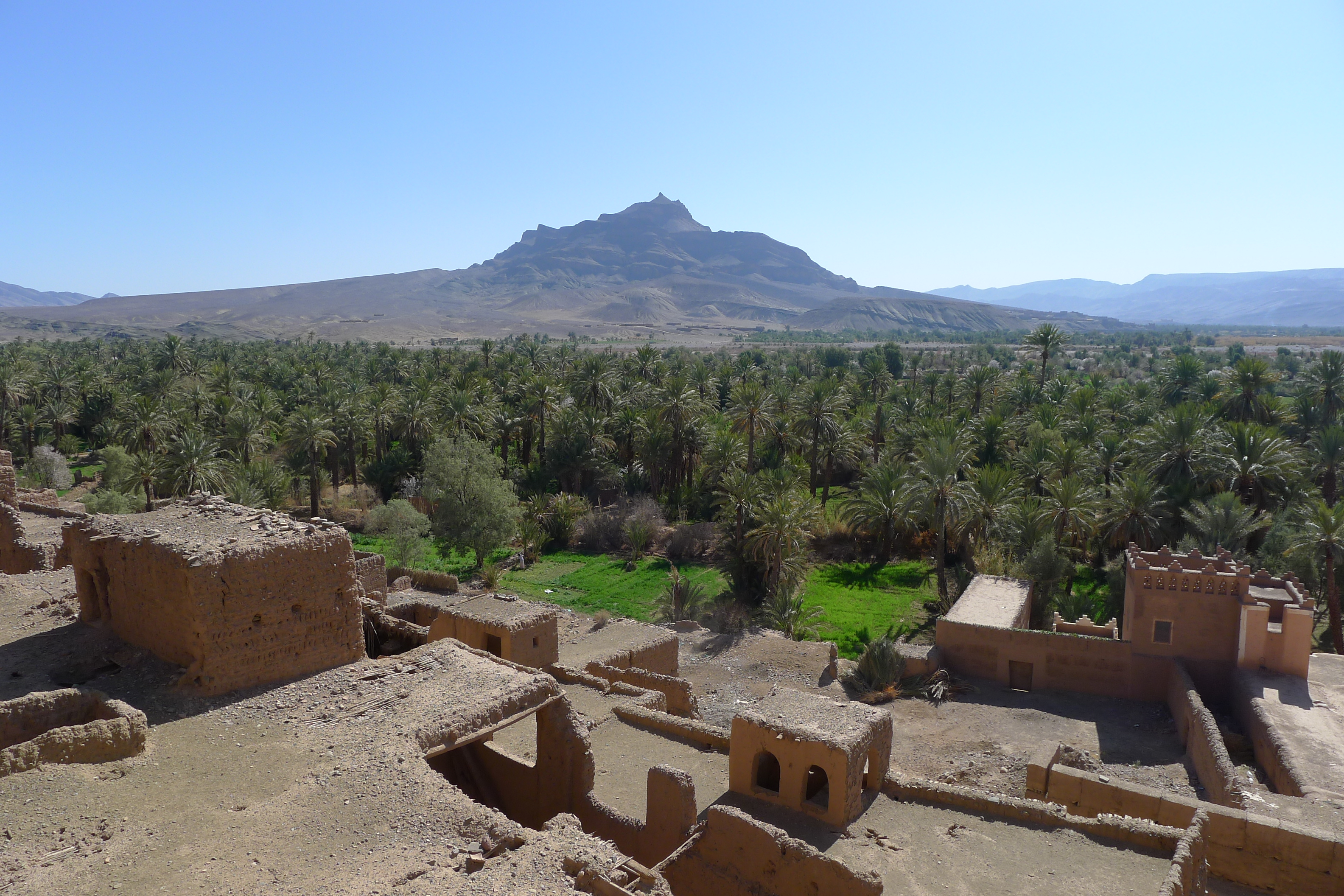 Djebel Kissane in Agdz, Marocco